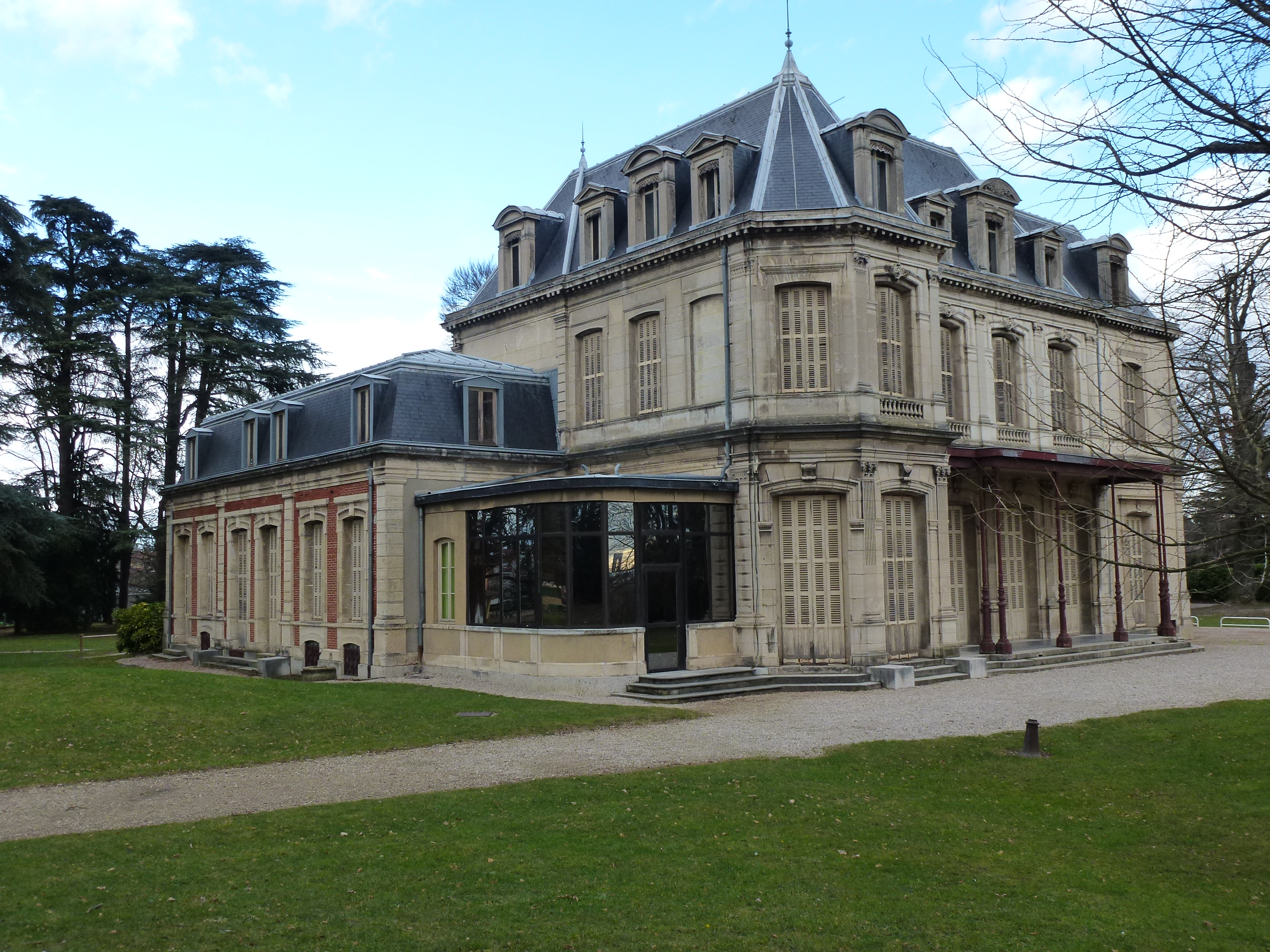 Château de Bernis à Sathonay-Village dans le Rhône.